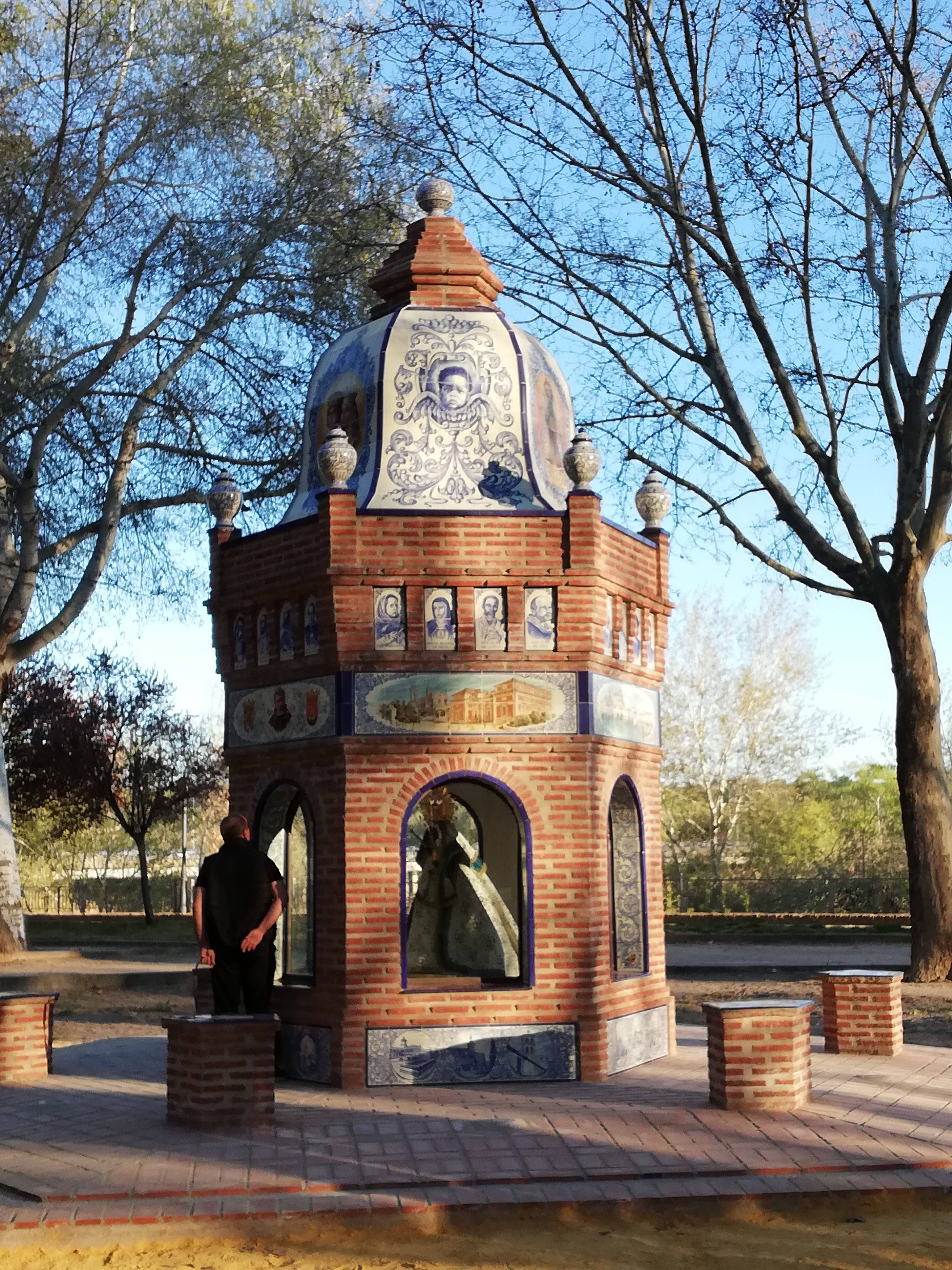 Monumento a la Virgen del Guadalupe en Talavera de la Reina